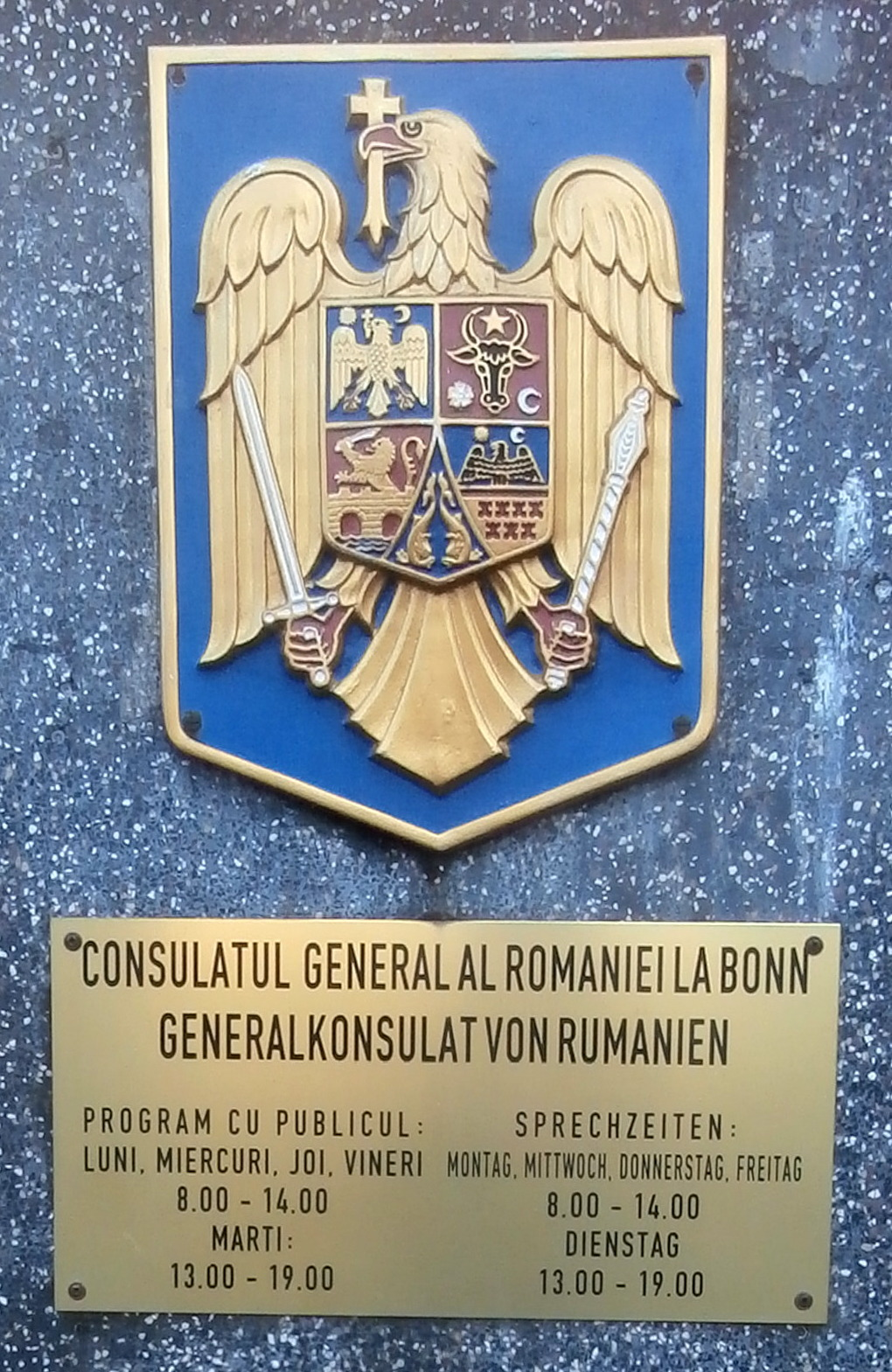 Generalkonsulat von Rumänien, Legionsweg 14, Bonn-Castell: Amtsschild und Wappen Rumäniens